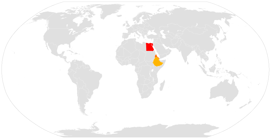 Países con jurisdicciones católicas de tradición litúrgica alejandrina